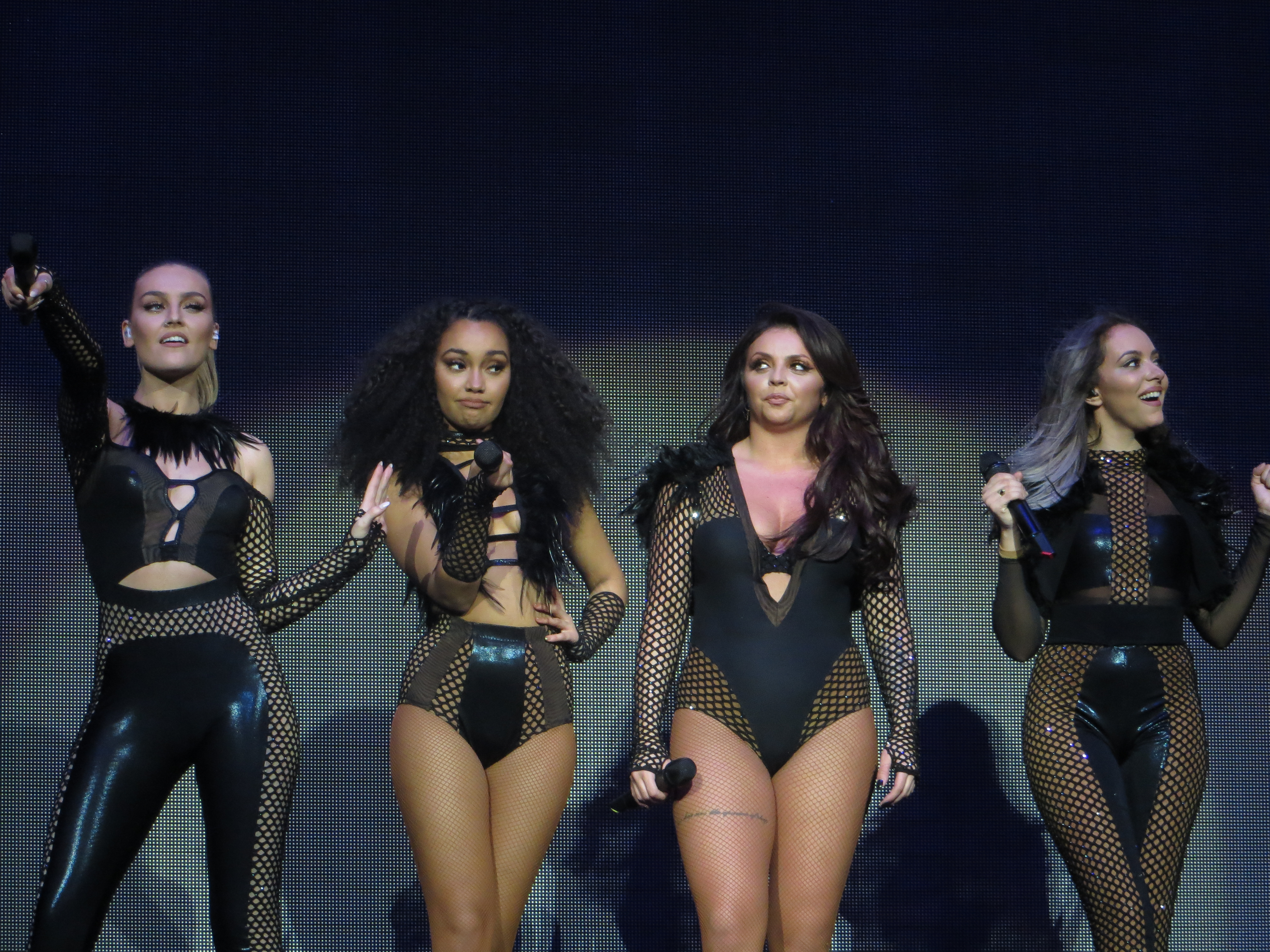 Little Mix 10